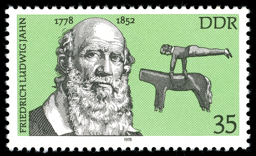 Ausgabepreis: 35 Pfennig First Day of Issue / Erstausgabetag: 18. Juli 1978 Auflage: 4.500.000 Entwurf: Gerhard Stauf Druckverfahren: Offsetdruck Michel-Katalog-Nr: Ländercode-MiNr: 2341